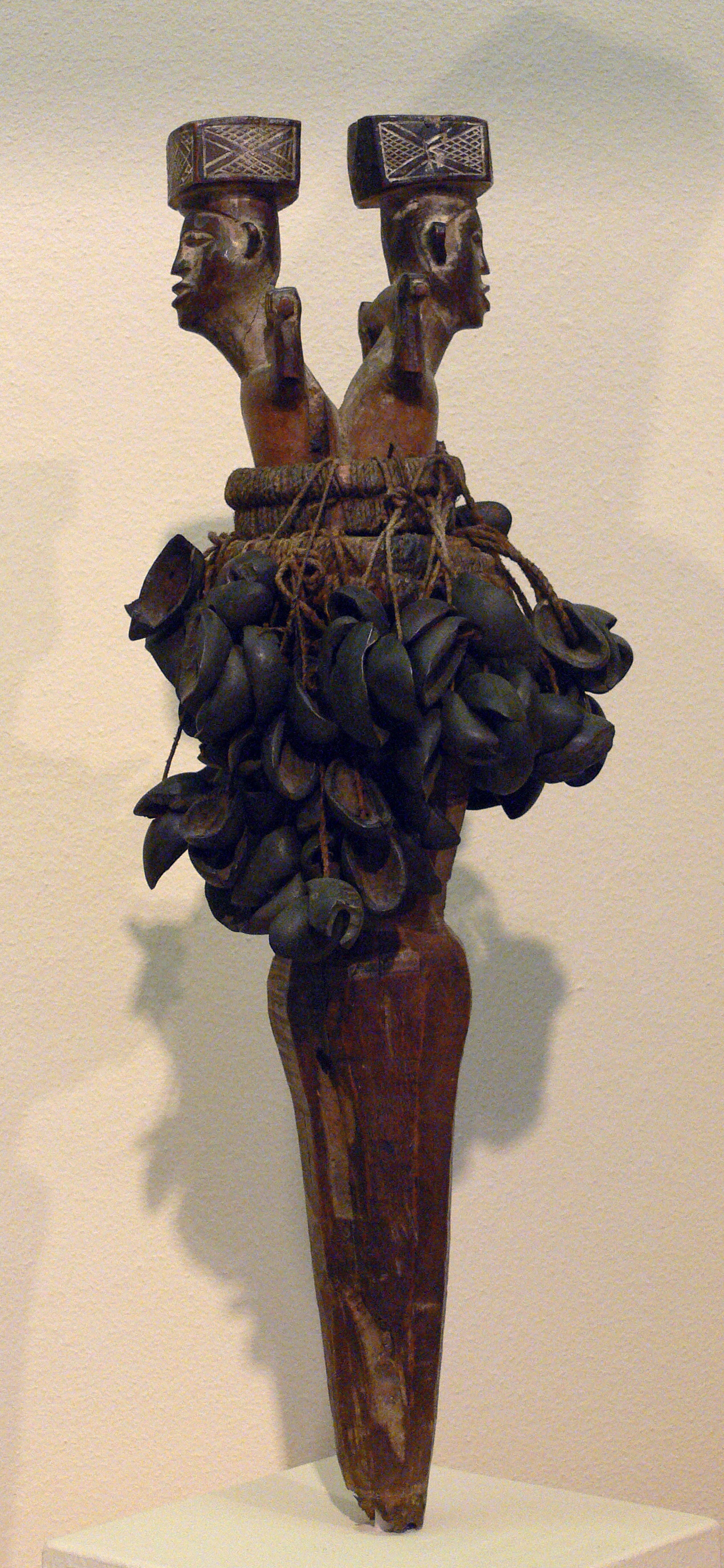 Stuttgart, Linden-Museum Initiationsrassel des Khimba-Bunds; Holz, Fruchtschalen, Pflanzenfasern; Vili (Republik Kongo), Inv. Nr. F 50687